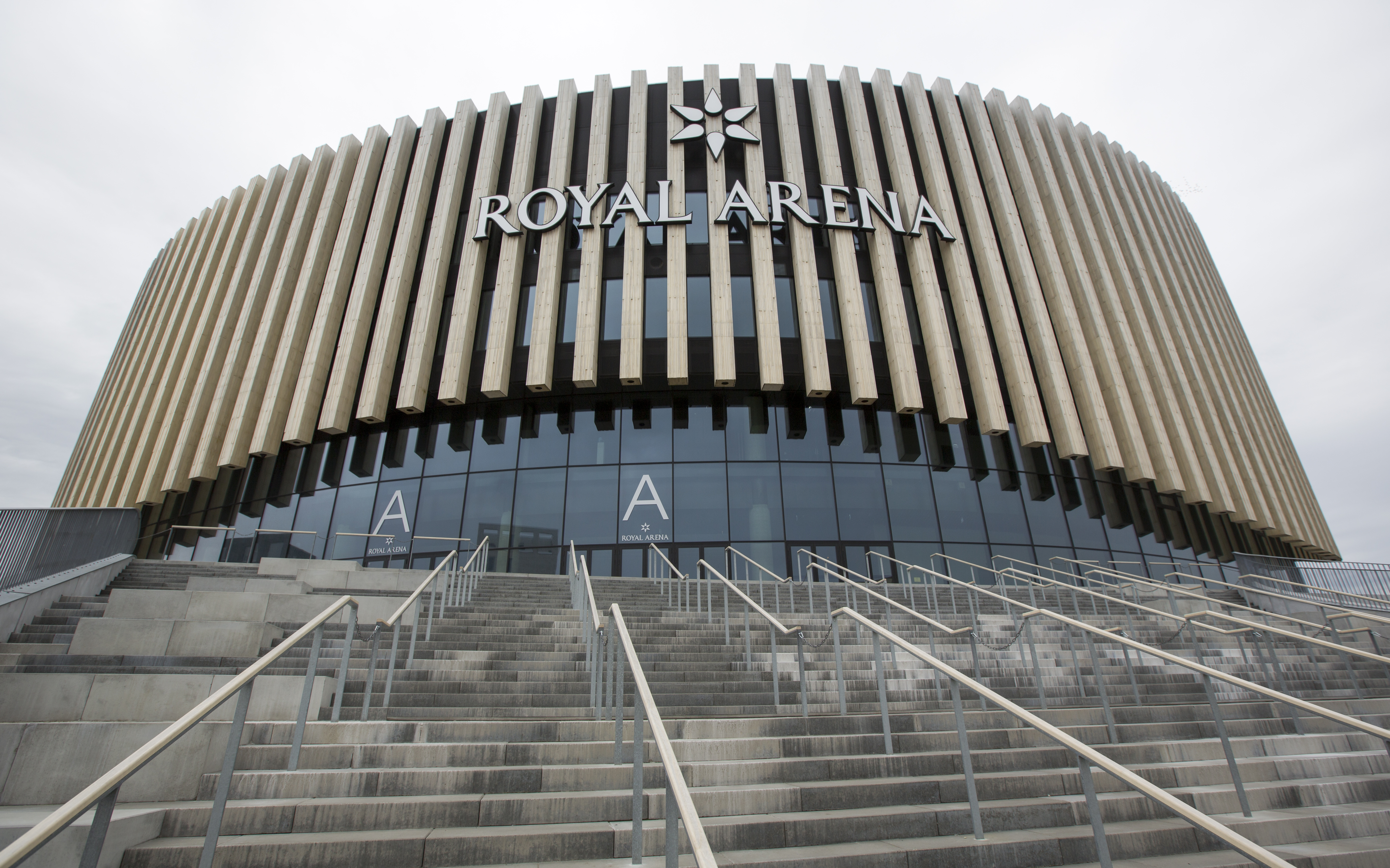 Multiarenanan Royal Arena i Ørestad, 2017-08-11. Photo: News Øresund - Jenny Andersson. © News Øresund - Jenny Andersson (CC BY 3.0). Detta verk av News Øresund är licensierat under en Creative Commons Erkännande 3.0 Unported-licens (CC BY 3.0). Bilden får fritt publiceras under förutsättning att källa anges. .The picture can be used freely under the prerequisite that the source is given. News Øresund, Malmö, Sweden.News Øresund är en oberoende regional nyhetsbyrå som är en del av det oberoende dansk-svenska kunskapscentrat Øresundsinstituttet.